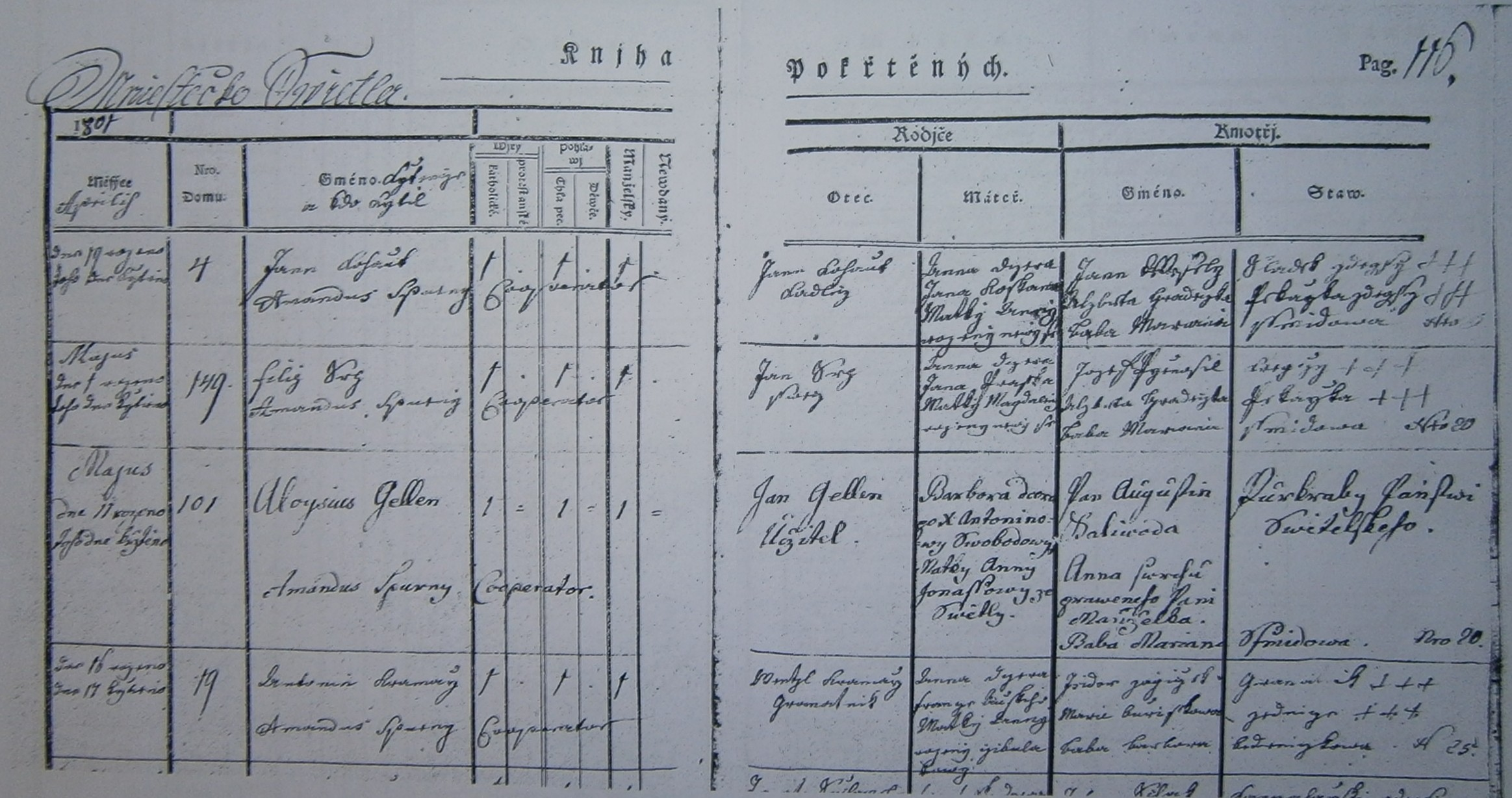 matrika narozených Světlá nad Sázavou - záznam o narození hudebního skladatele Aloise Jelena (1801-1857)